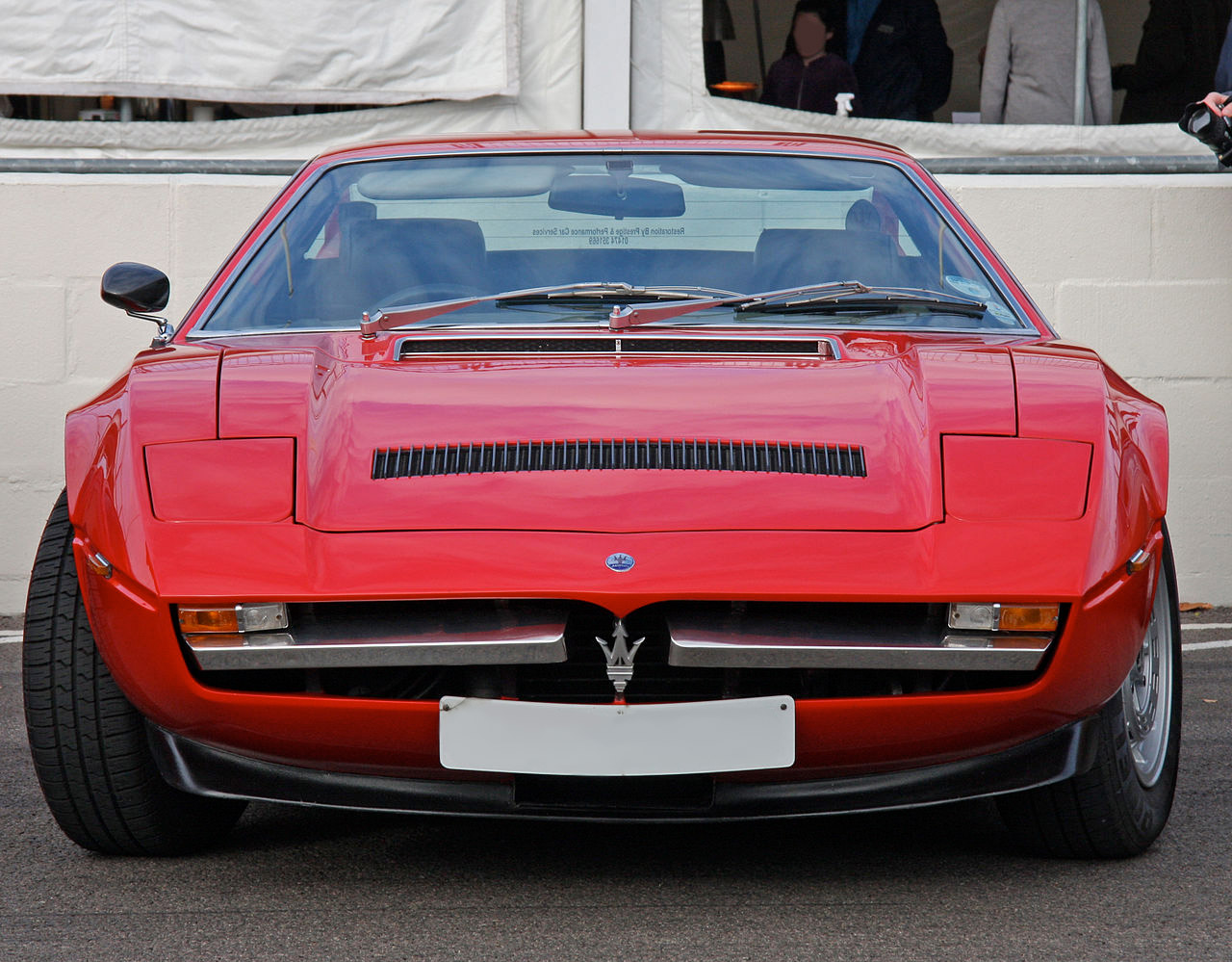 Maserati Merak